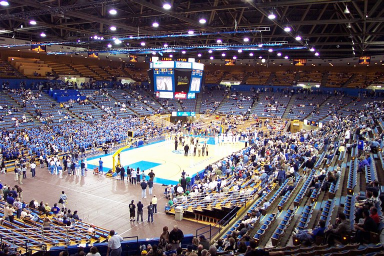 Pauley PavilionPauley Pavilion